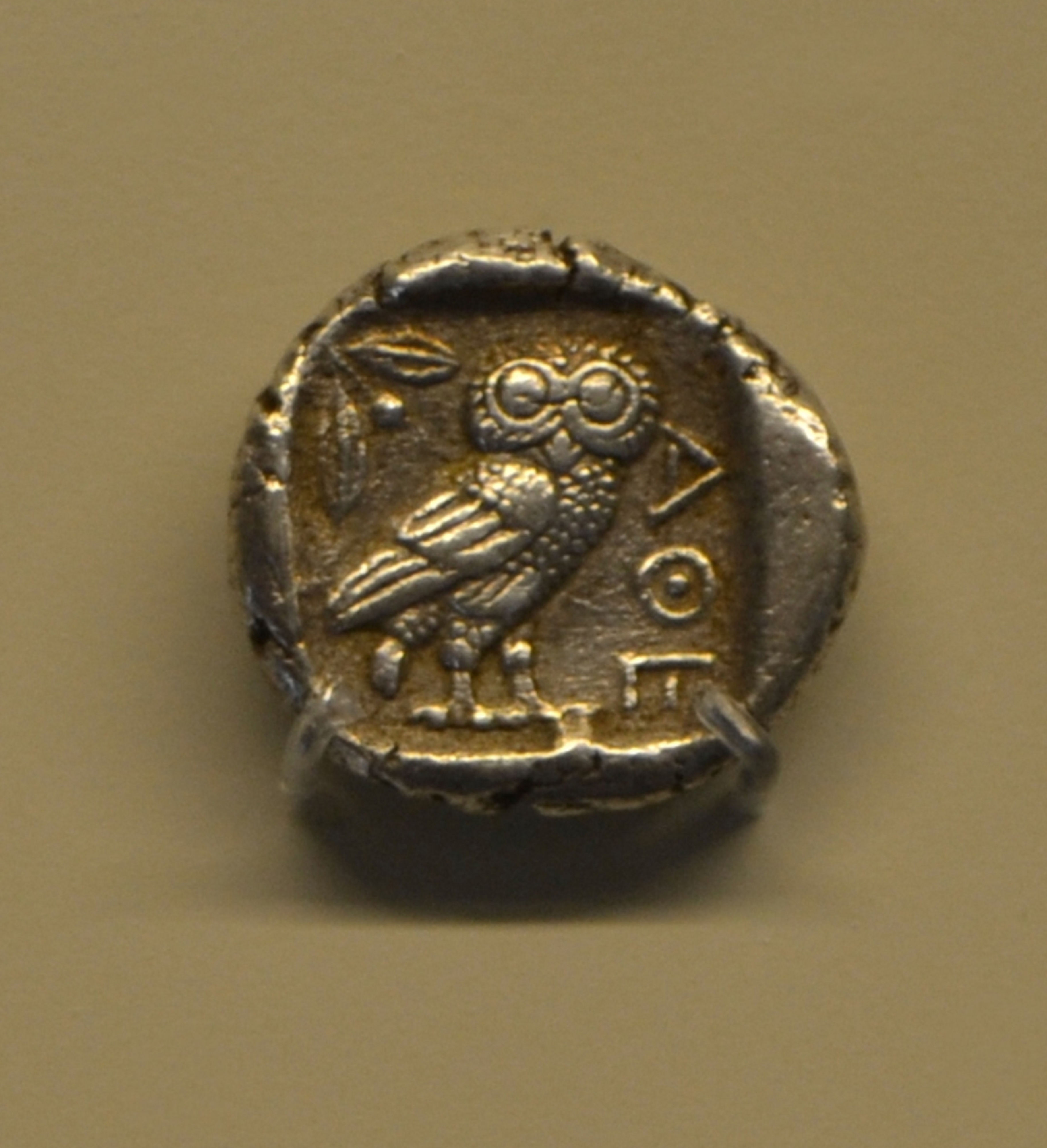 Dracma de plata de Atenas (M.A.N.)